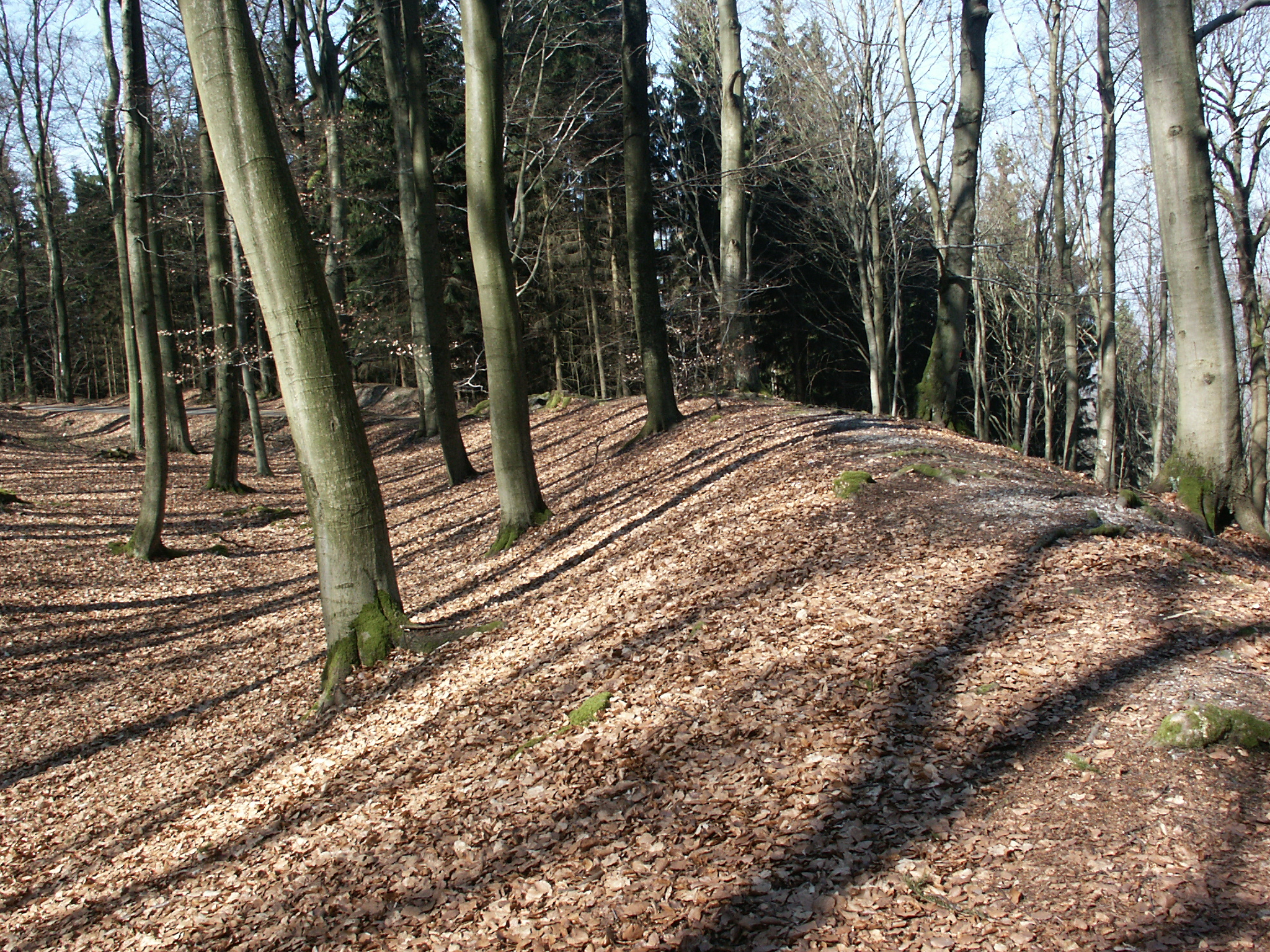 Ein Wall auf dem früher von Kelten besiedelten Dünsberg bei Gießen